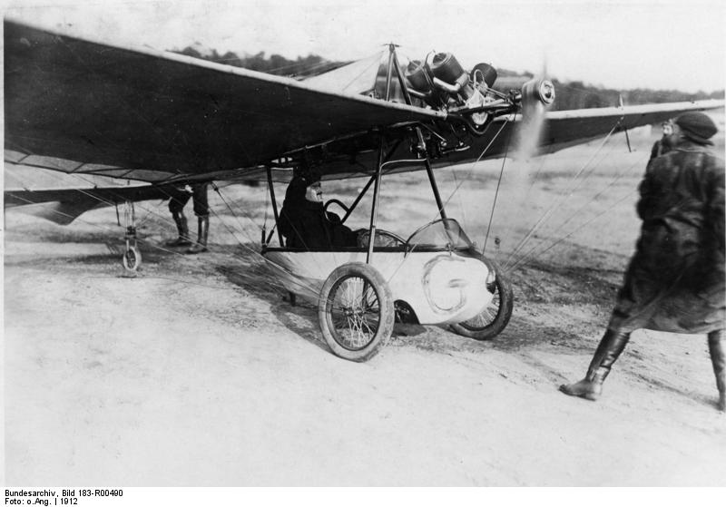 Hans Grade Hans Grade am Start in Johannisthal 21049-12 ADN-Text: ADN-Bildarchiv Deutschland 1912: Der deutsche Flugzeugkonstrukteur Hans Grade kurz vor dem Start in seinem Eindecker in Berlin-Johannisthal. 21049-12 Abgebildete Personen: Grade, Hans: Flugpionier, Deutschland